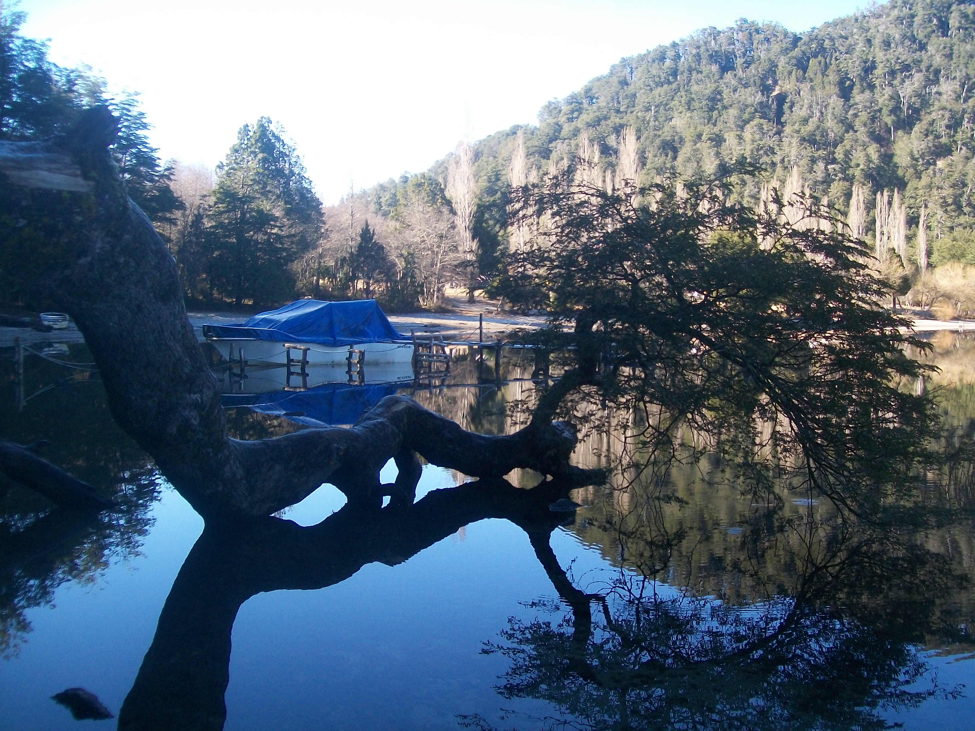 Lago Espejo Chico, camino de los siete lagos, Neuquén, Argentina